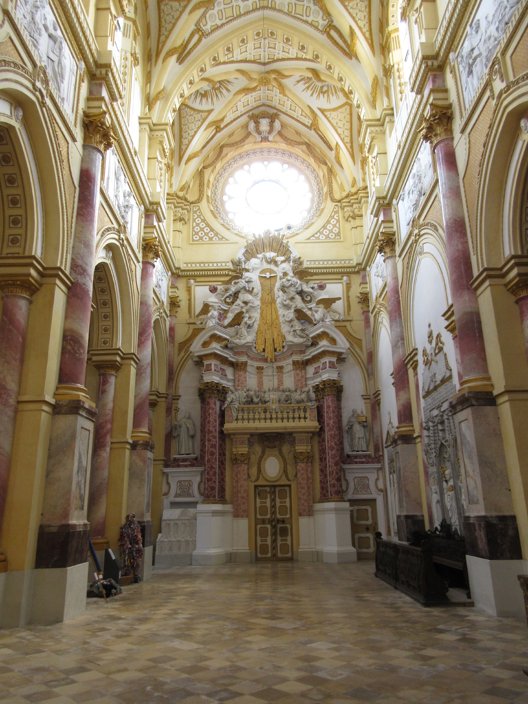 Zugang zur Sakristei und Darstellung des Pfingstwunders